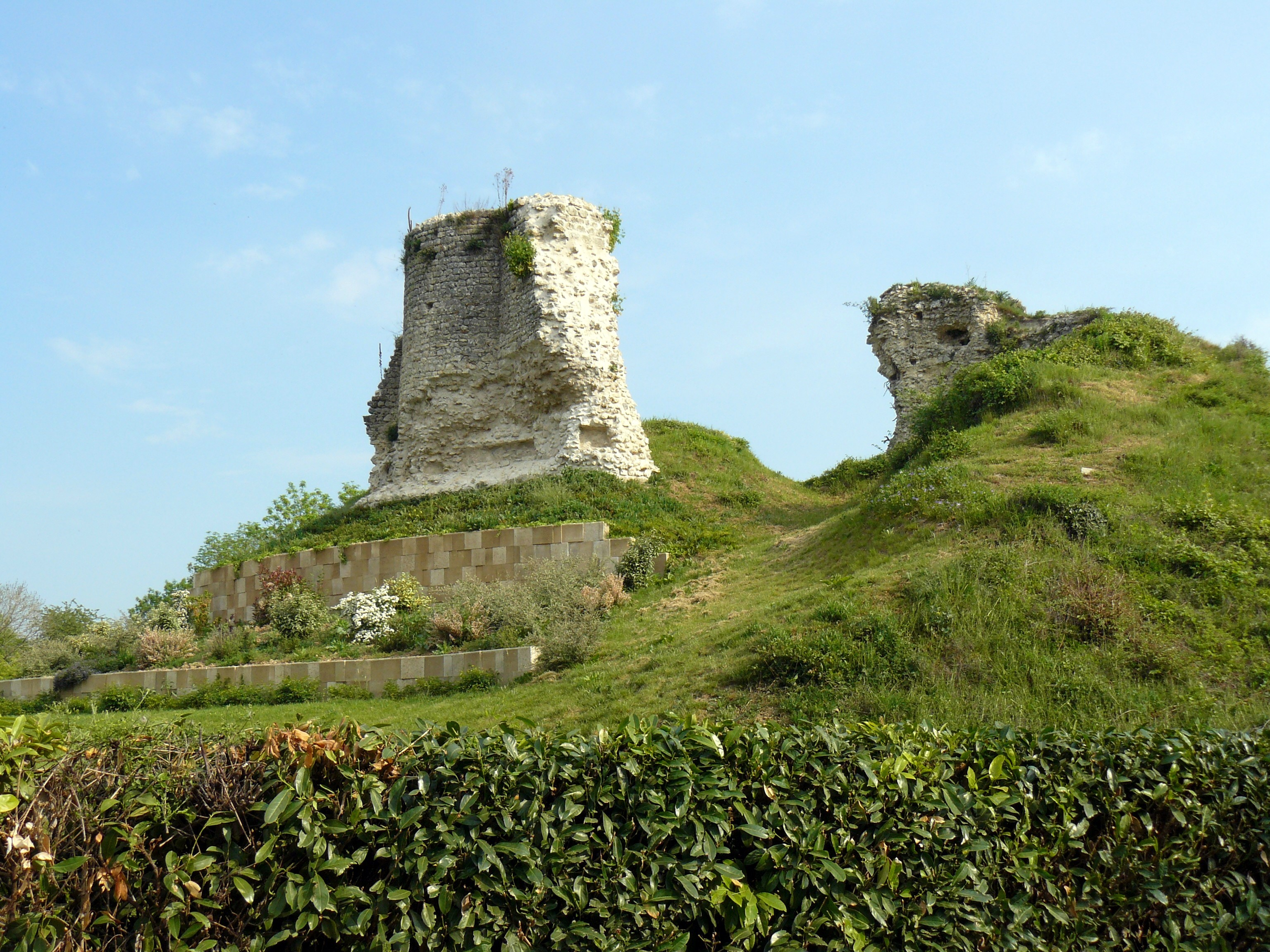 Ruines du donjon de Montchauvet (Yvelines, France). XIIe siècle.